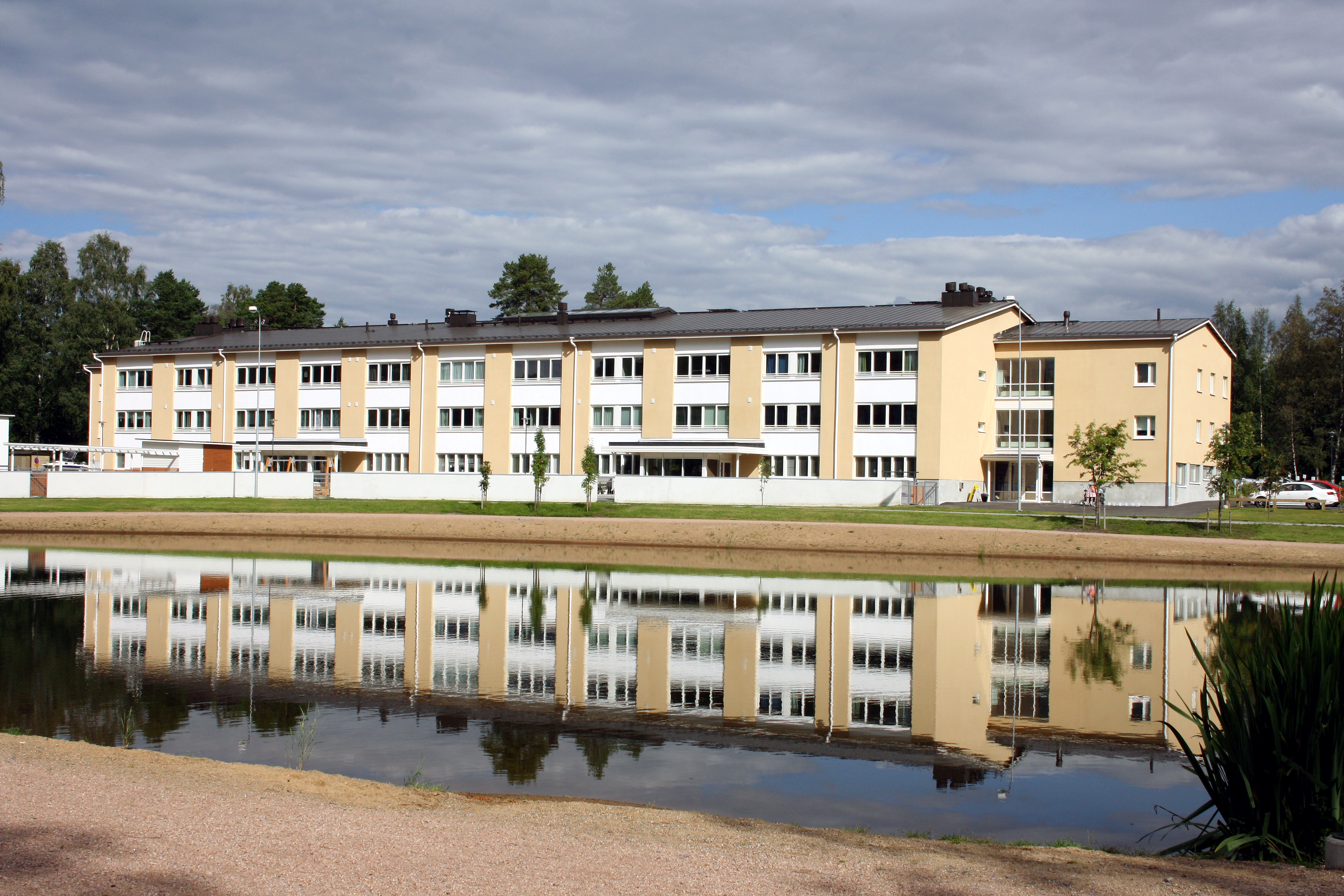 Asekoulun entisiä rakennuksia Pikiruukissa, Kokkolassa.